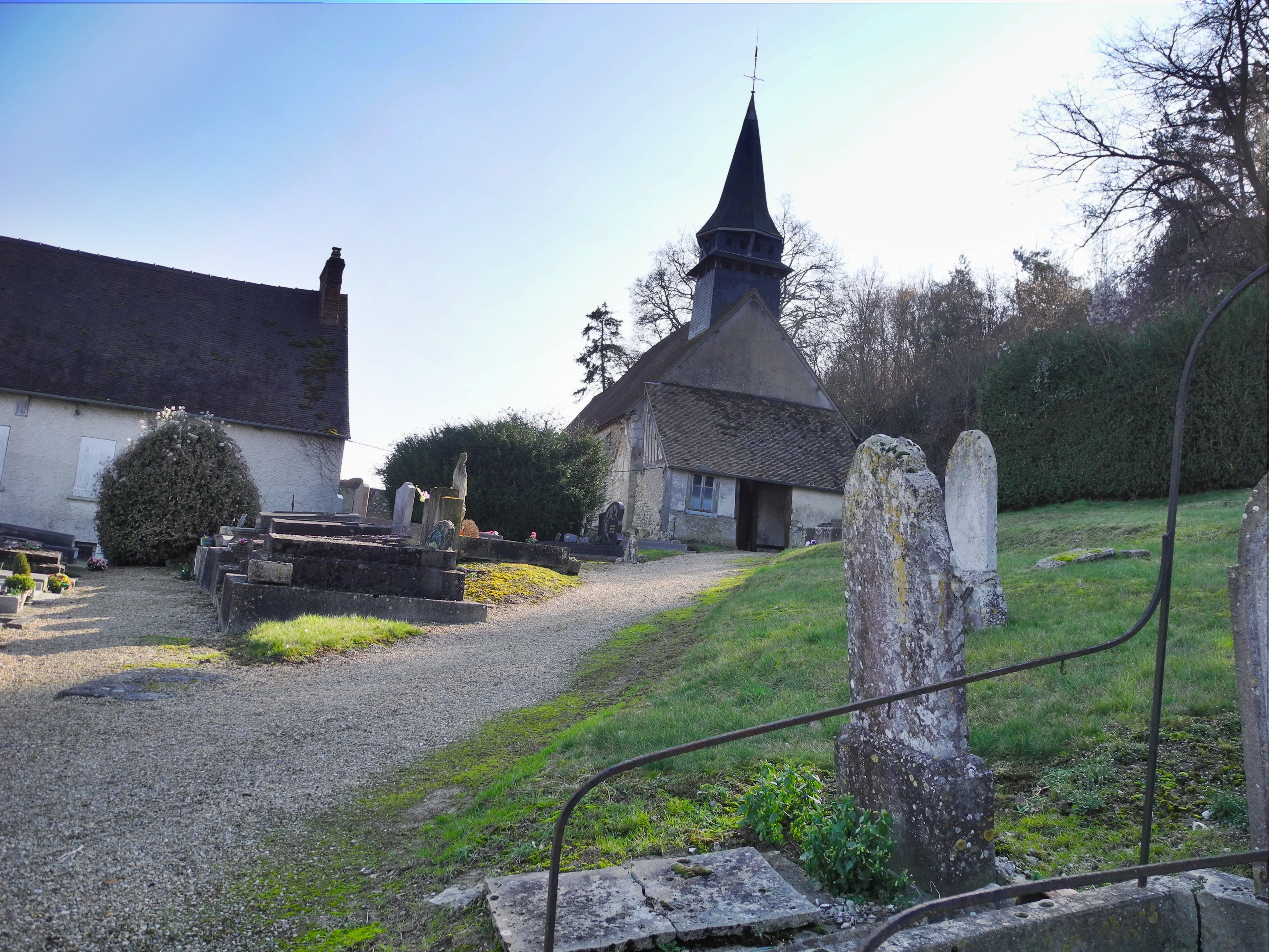 Eglise de Gadencourt (Eure)